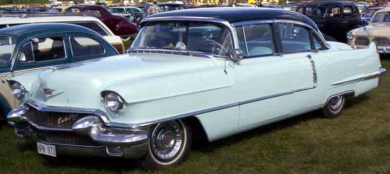 1956 Cadillac Series 56-6219(X) Sedan